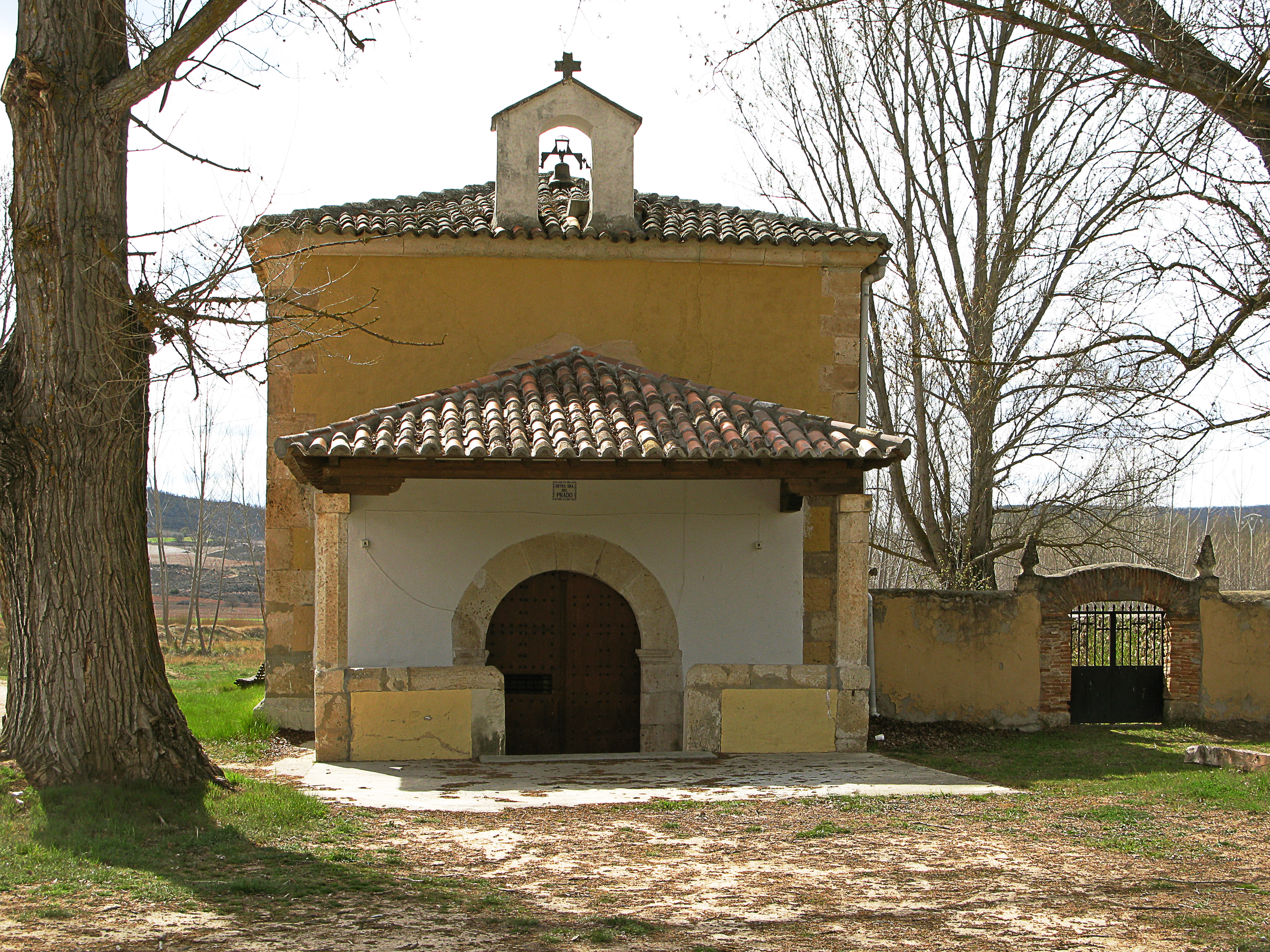 Ermita de Nuestra Señora del Prado, en Valderrebollo, municipio de Guadalajara, España.